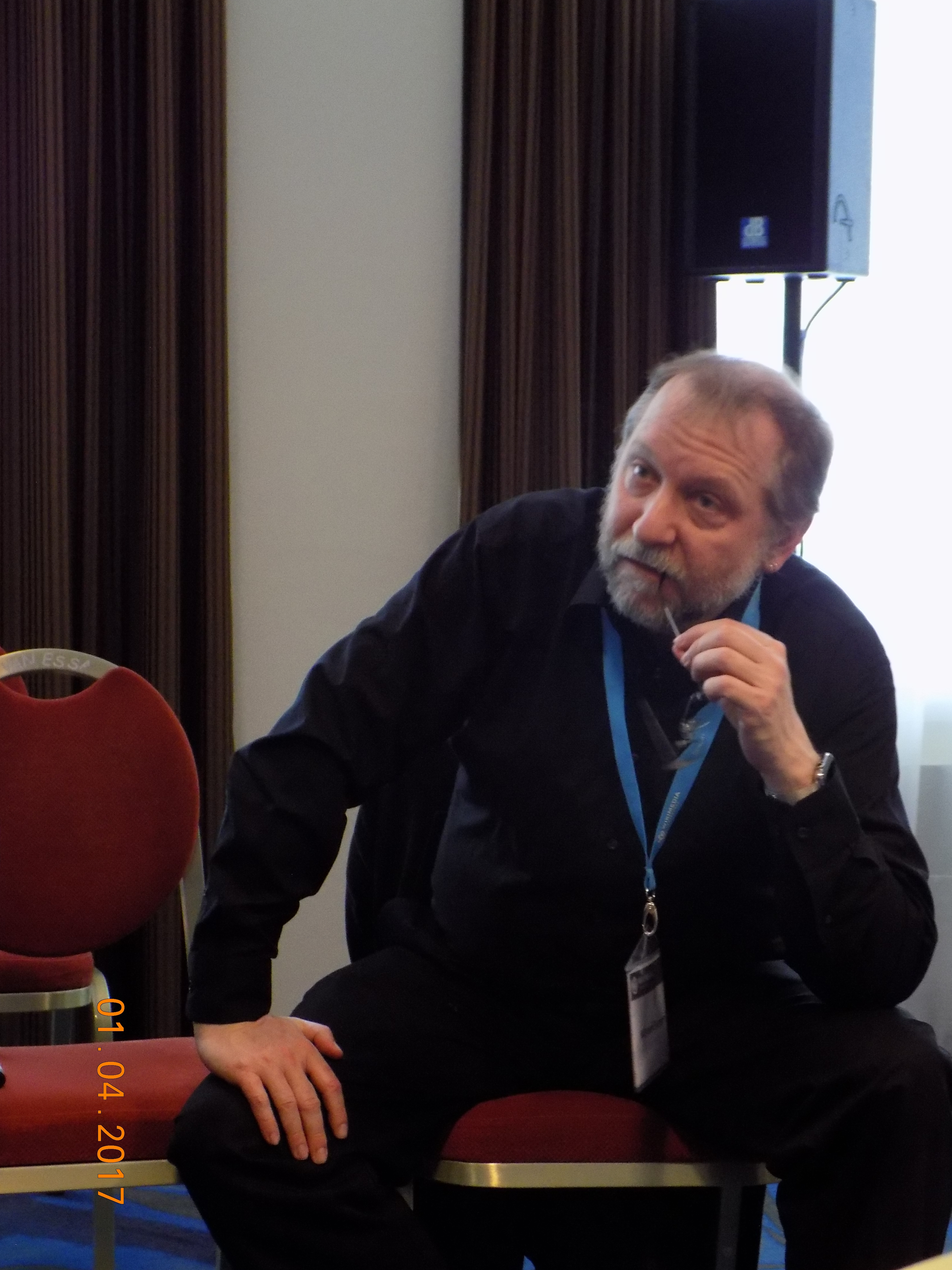 Эверсон Майкл на Берлинской конференции. 2017 г.